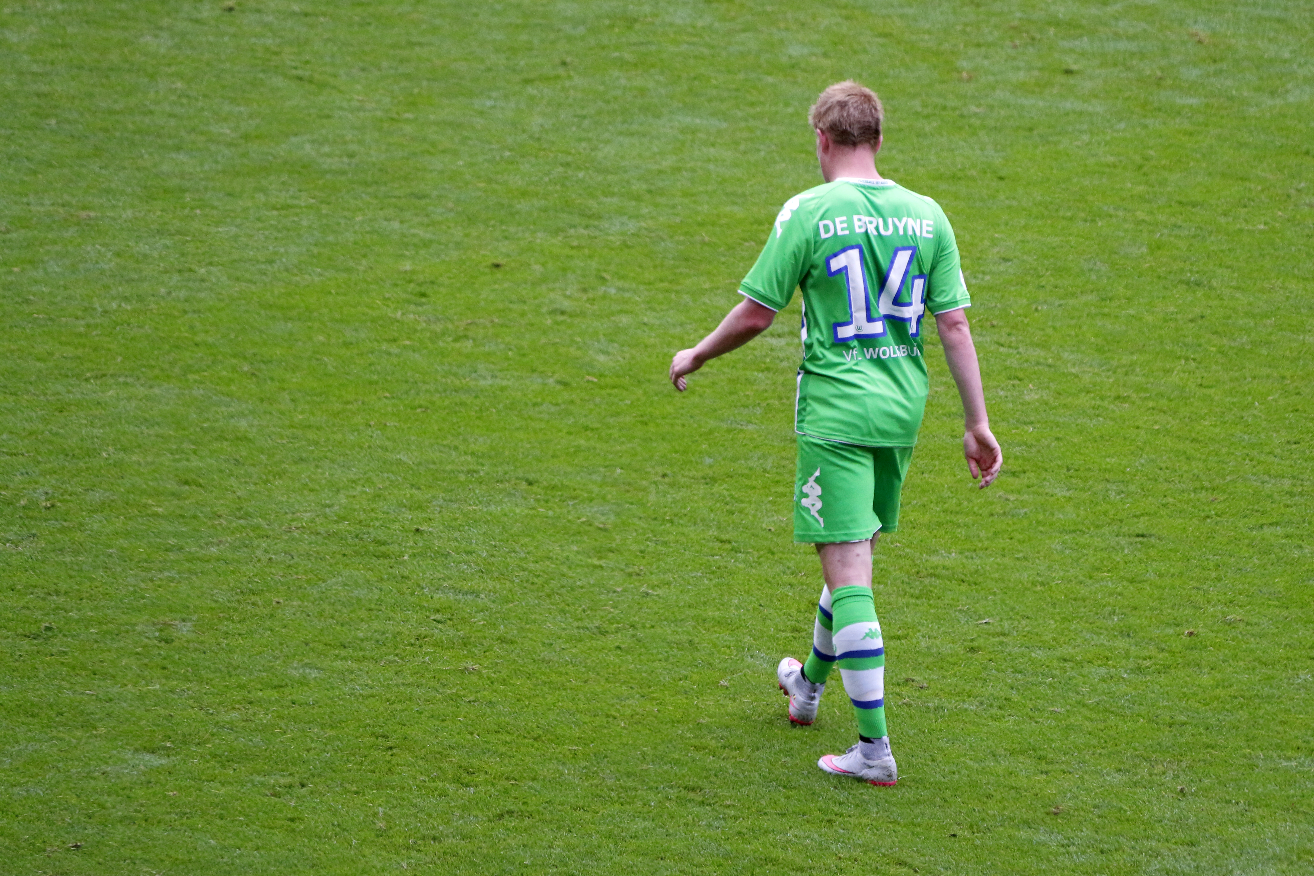 Emirates Cup 2015, Emirates Stadium